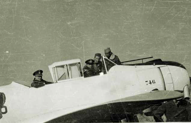 Con motivo del Día del Ejército, el Ministro de Guerra de la República Argentina, Coronel Juan Domingo Perón (en el asiento trasero de artillero / radiooperador), se dispone a realizar un vuelo de evaluación del prototipo del I.Ae.22 "DL".